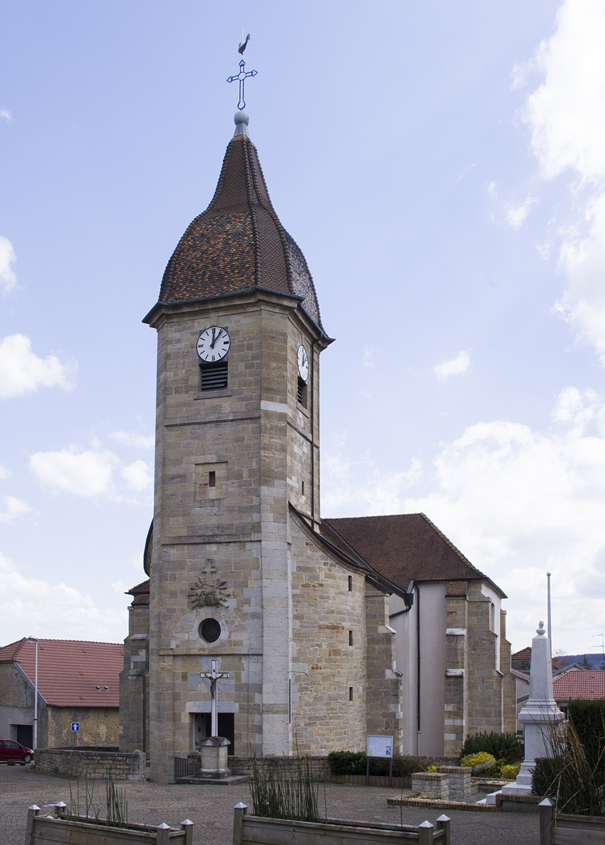 Eglise de Noidans, façace